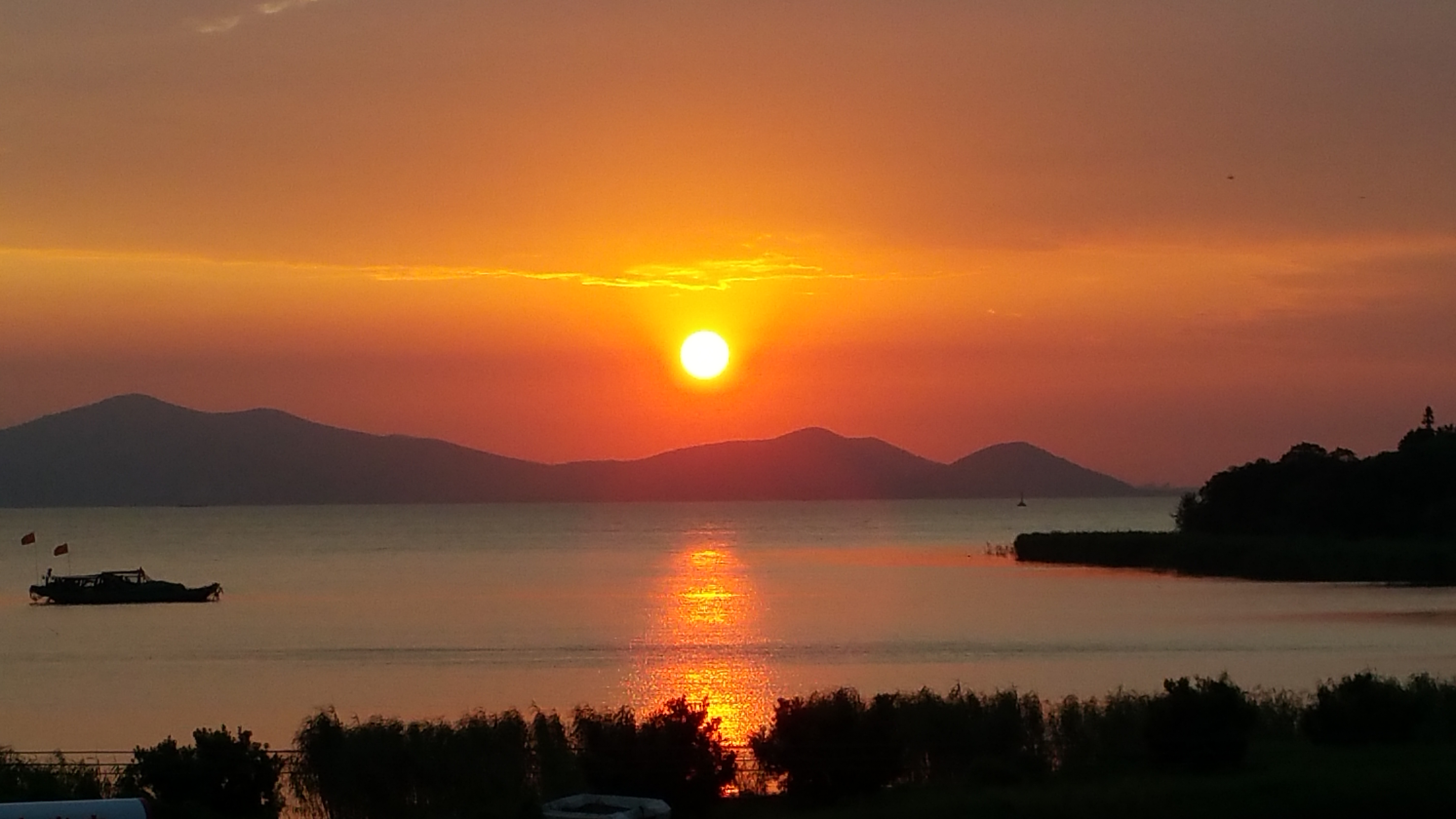 Binhu, Wuxi, Jiangsu, China